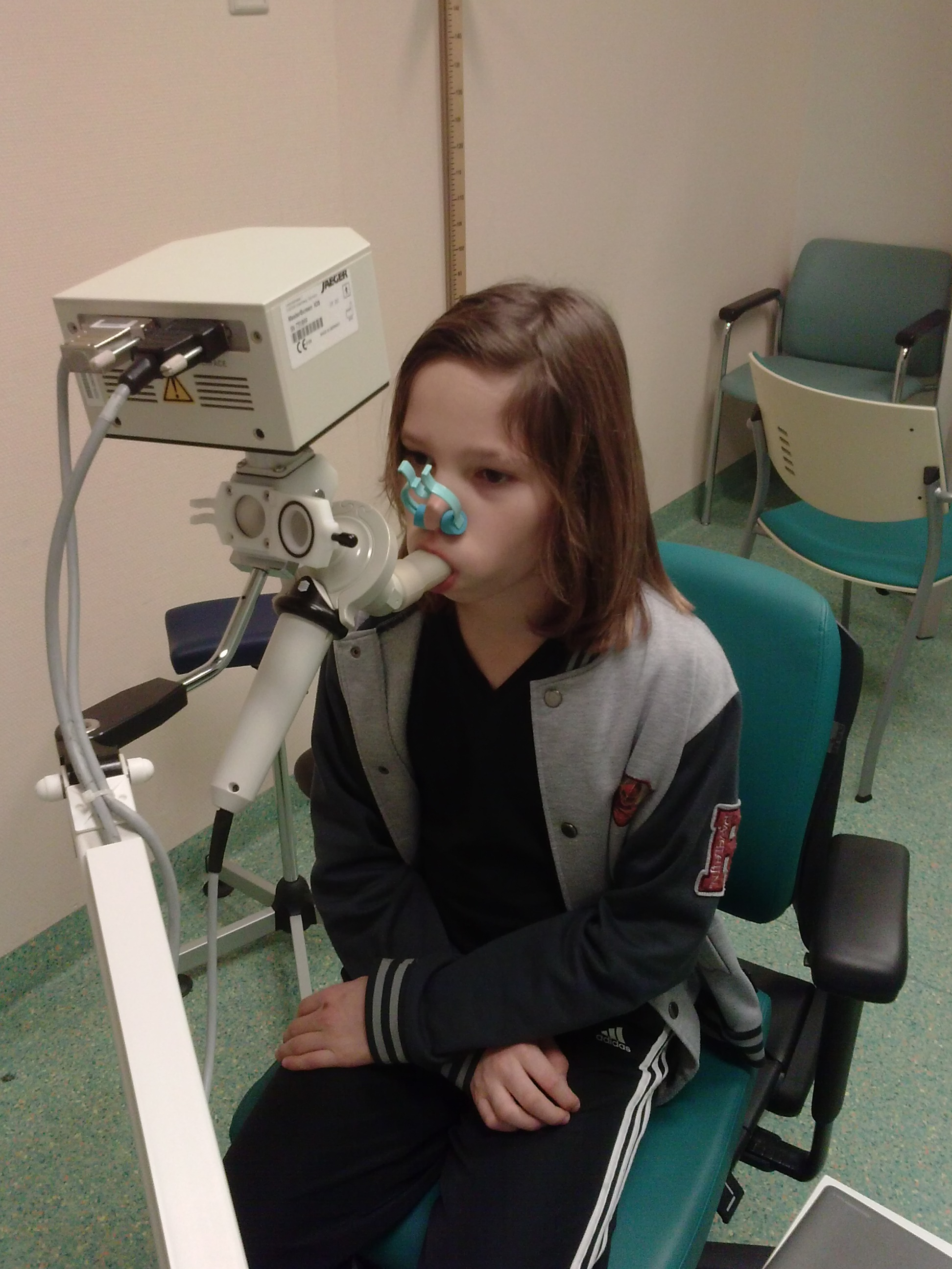 Spirometrie uitvoering